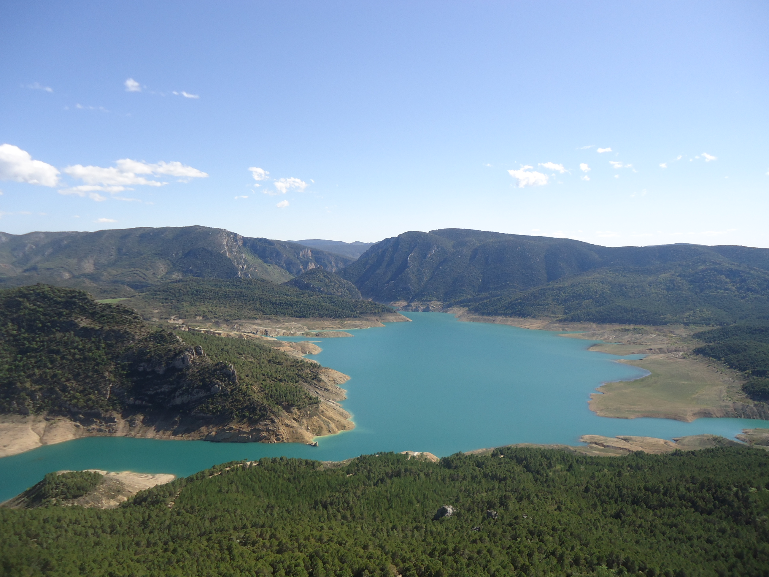 La sierra del Montsec forma parte del conjunto de Sierras Exteriores del Pirineo Central. Discurre de este a oeste a lo largo de unos 40 km de longitud, cortada por los ríos Noguera Ribagorzana y Noguera Pallaresa. El Noguera Ribagorzana, frontera natural entre Aragón y Cataluña, al atravesar la sierra del Montsec separa Montsec de L’Estall (o sierra de Montgai), en la provincia de Huesca, del Montsec d’Ares, en Lleida.